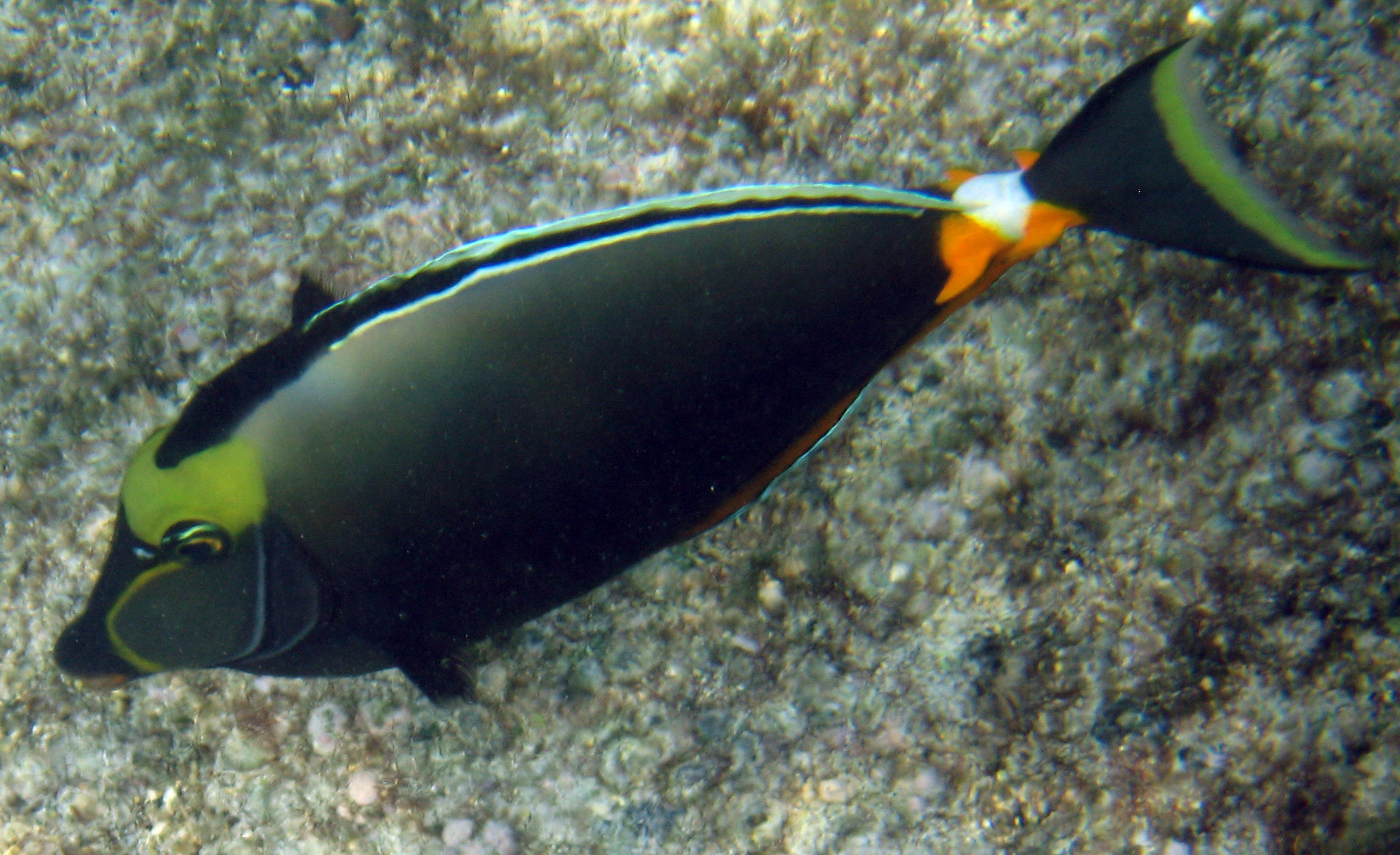 Naso lituratusImage #12510 (